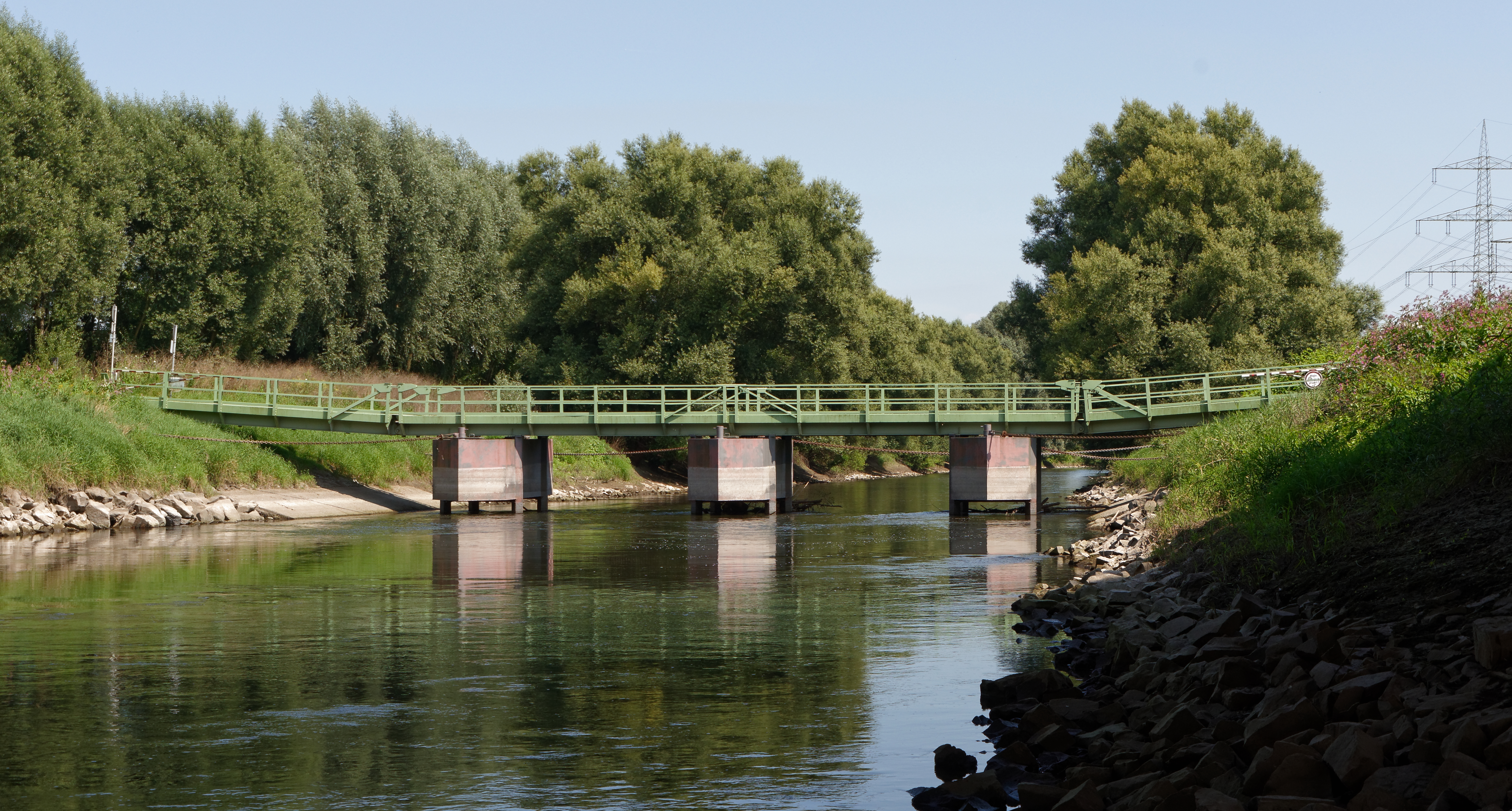 Schwimmbrücke Rheindorf